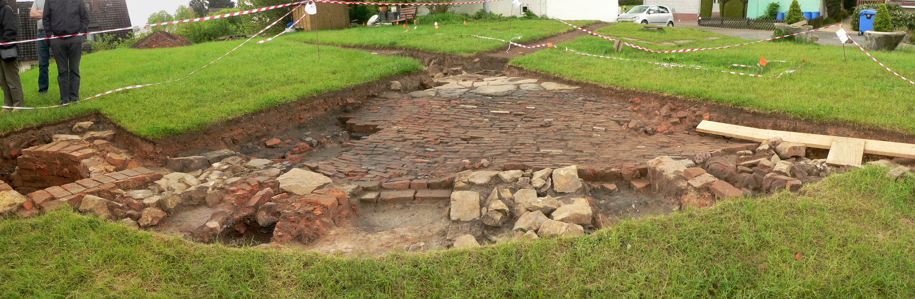 Panorama der Grabung im Bereich der Glashütte Klein Süntel